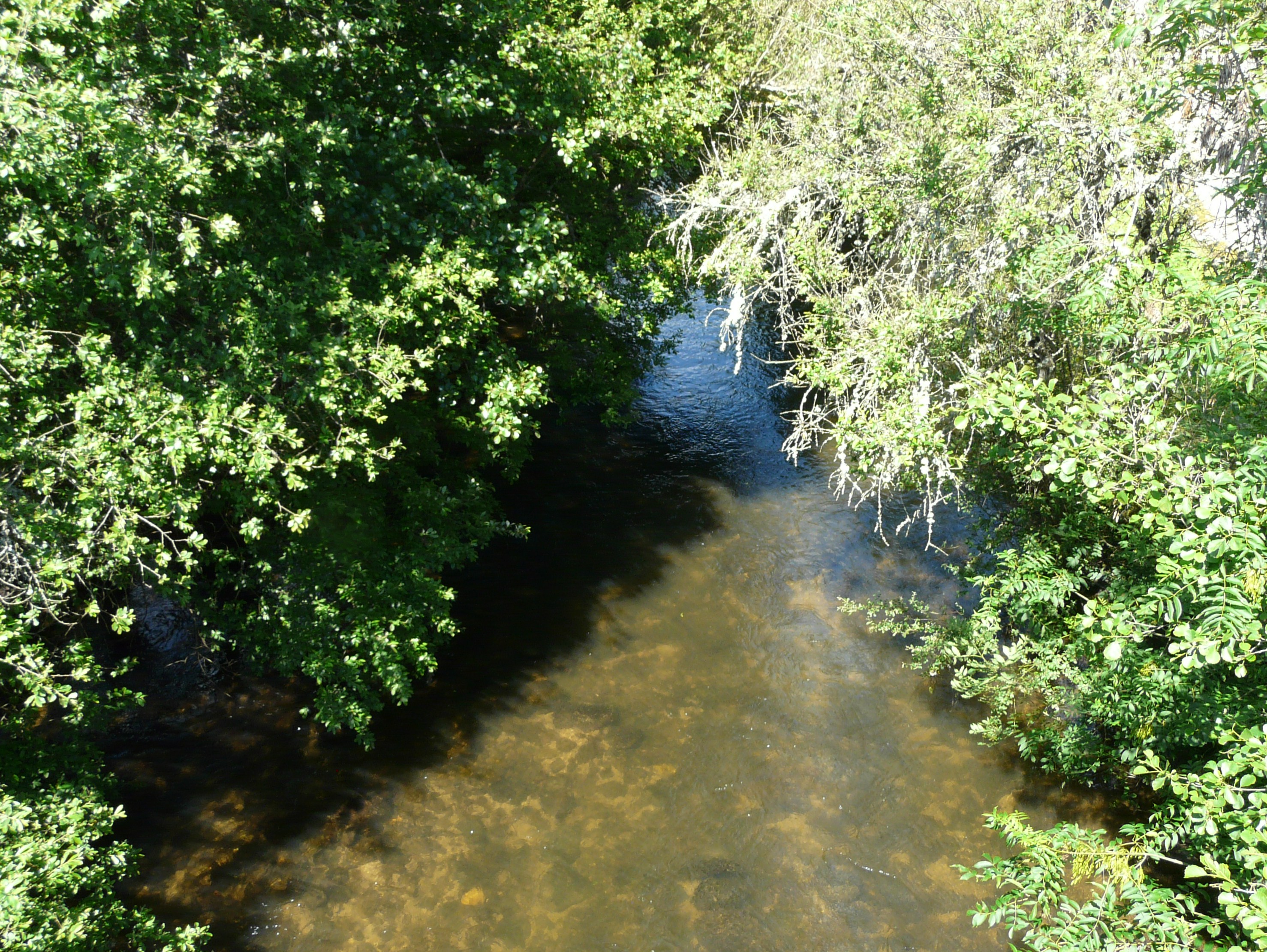 Le Siniq environ 300 mètres avant sa confluence avec la Bromme, Brommat, Aveyron, France. Vue prise en direction de l'amont.